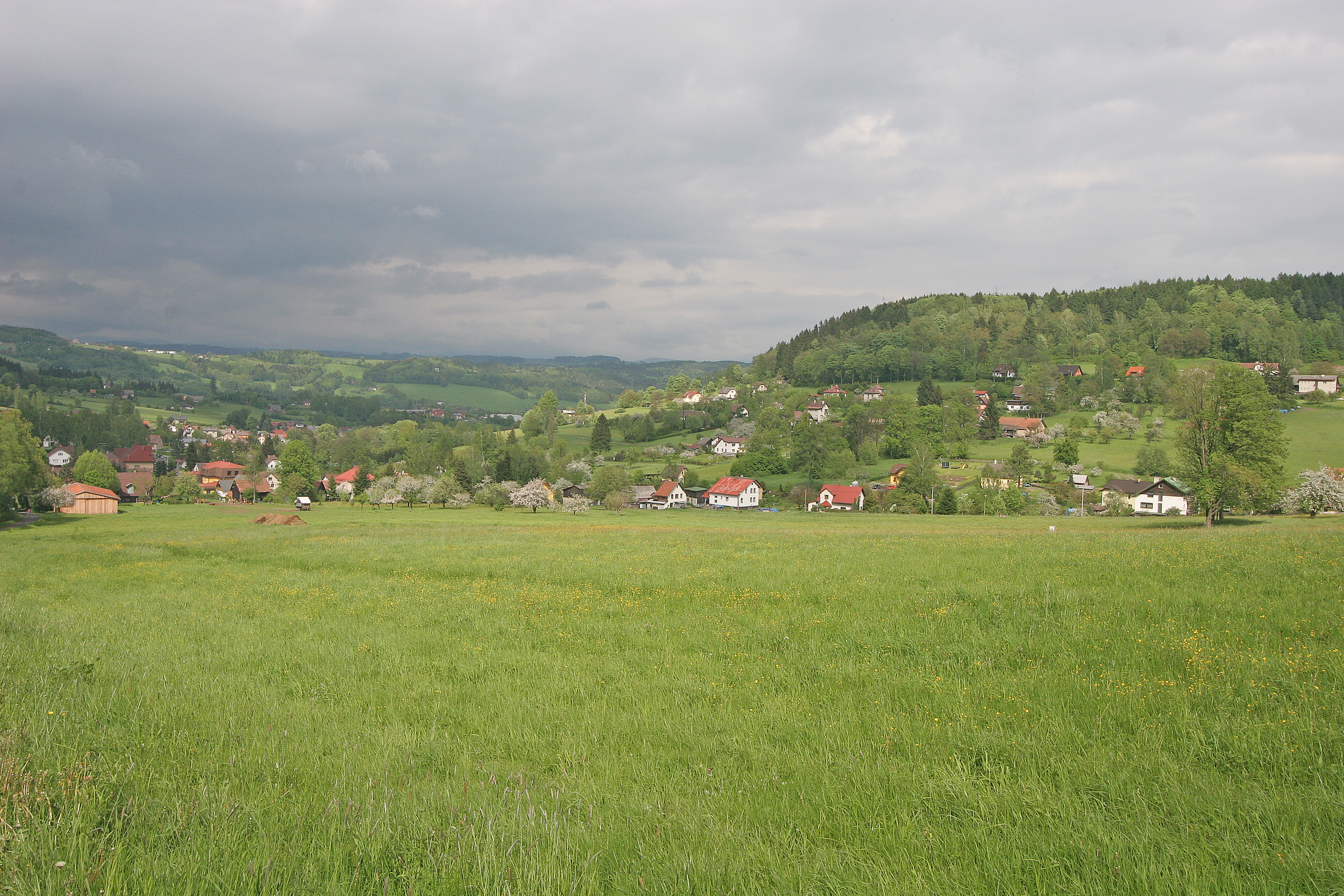 Chuchelna z cesty z Komárova